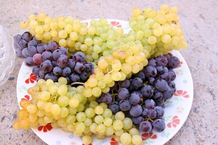 تۆرکجه: اورمو شهرین باغلاریندان حاصیلا گلن اوزوم